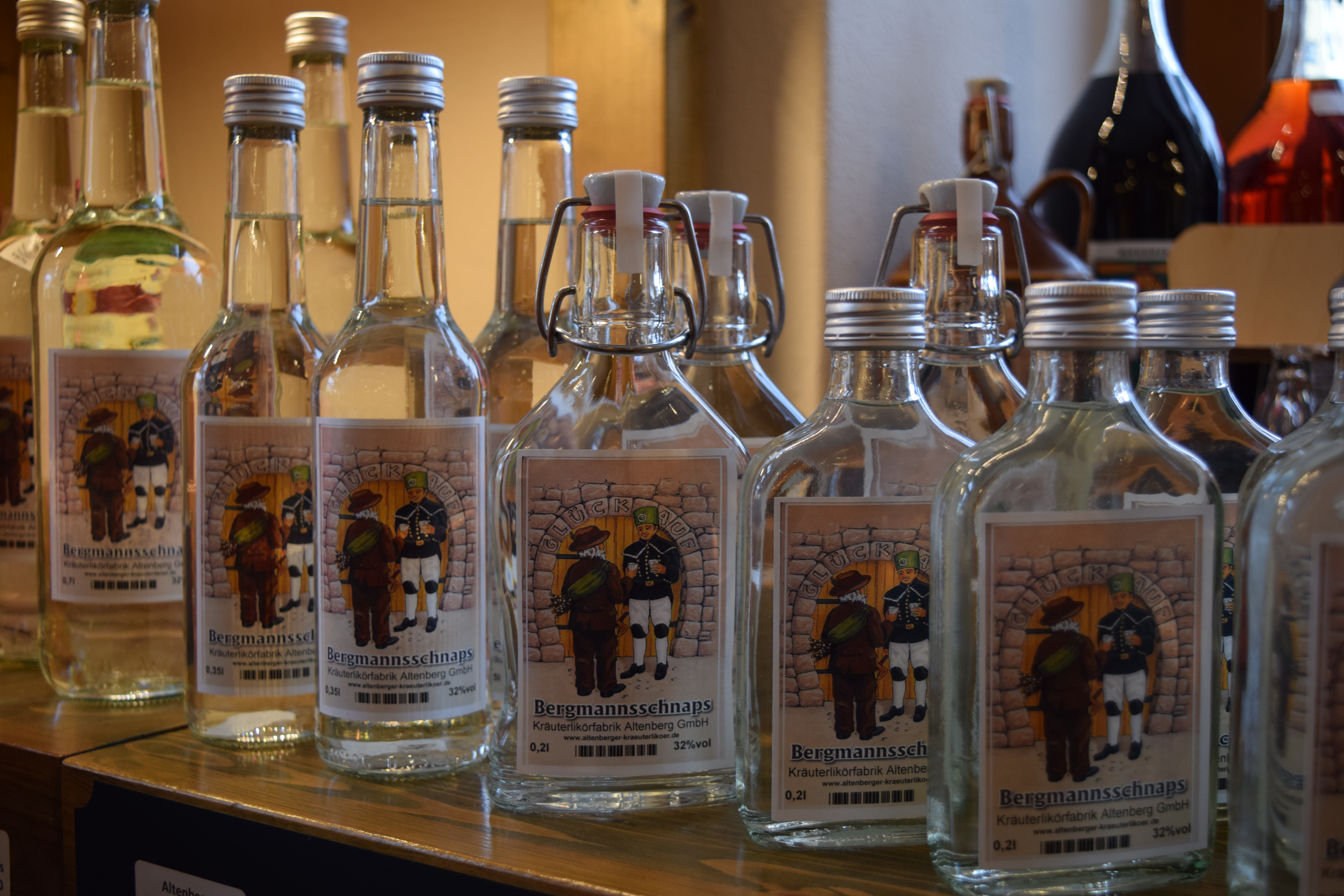 Altenberger Bergmannschnaps